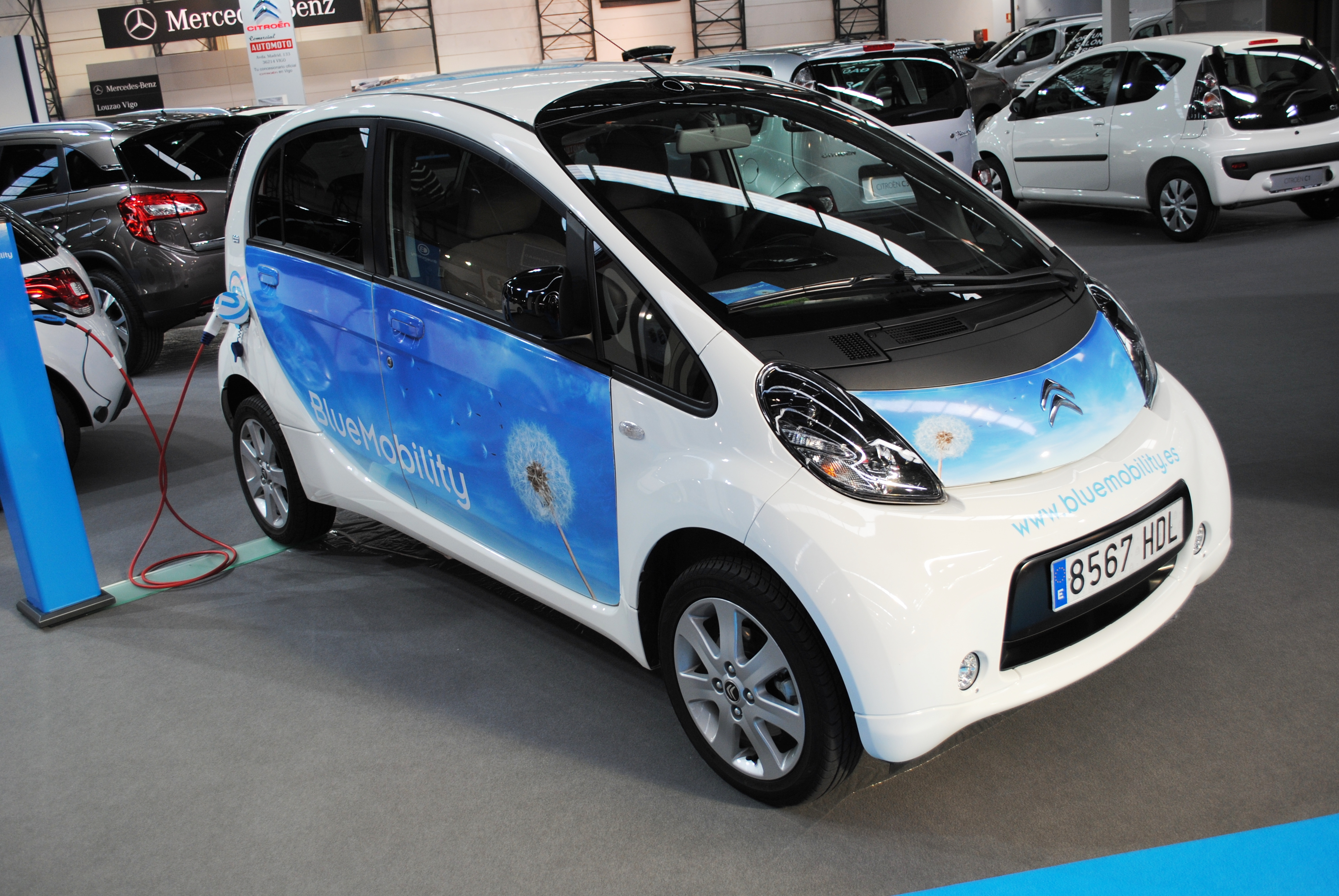 CITROËN C-ZERO, 2012, IFEVI